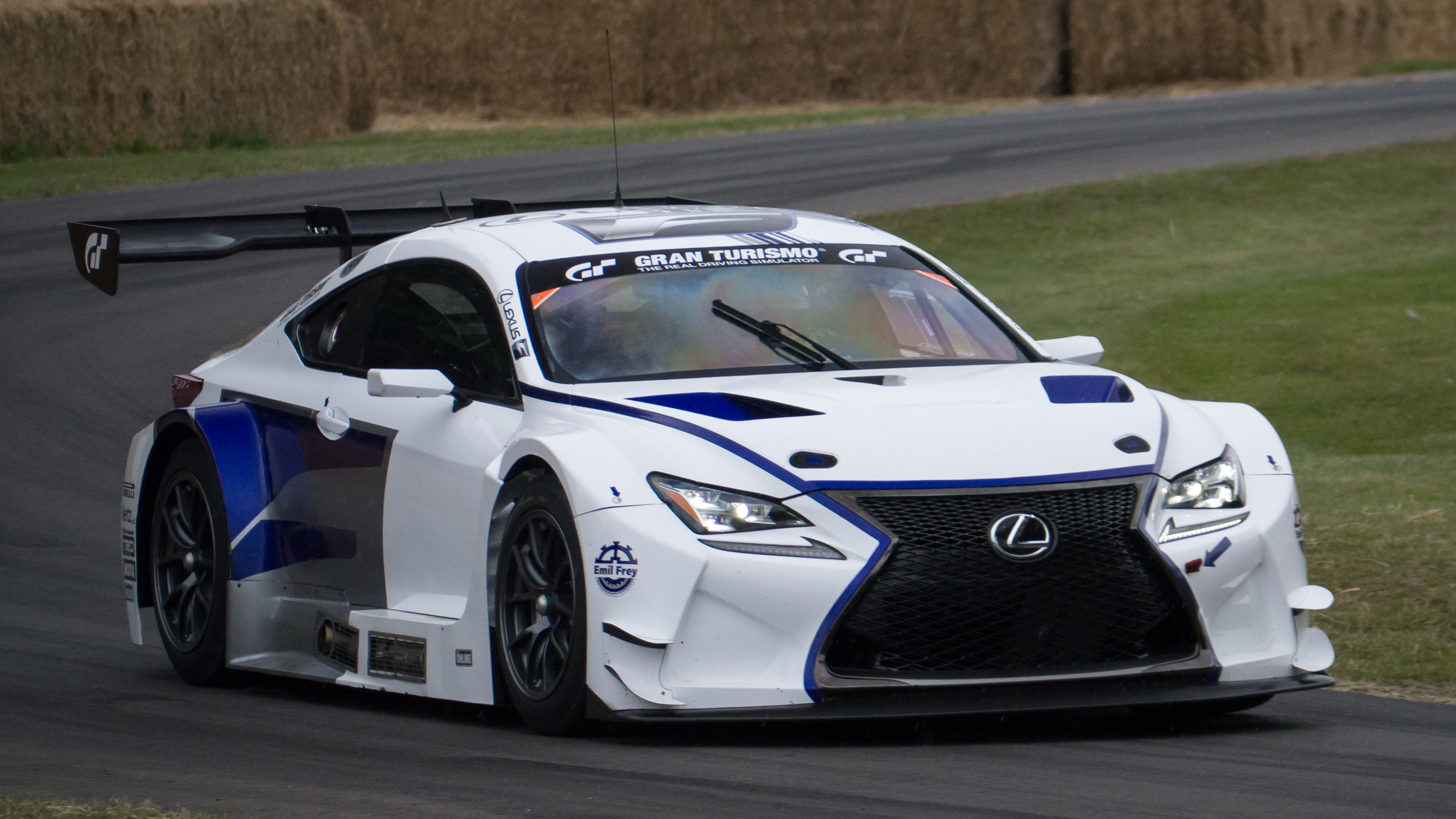 2015 Lexus RC-F GT3